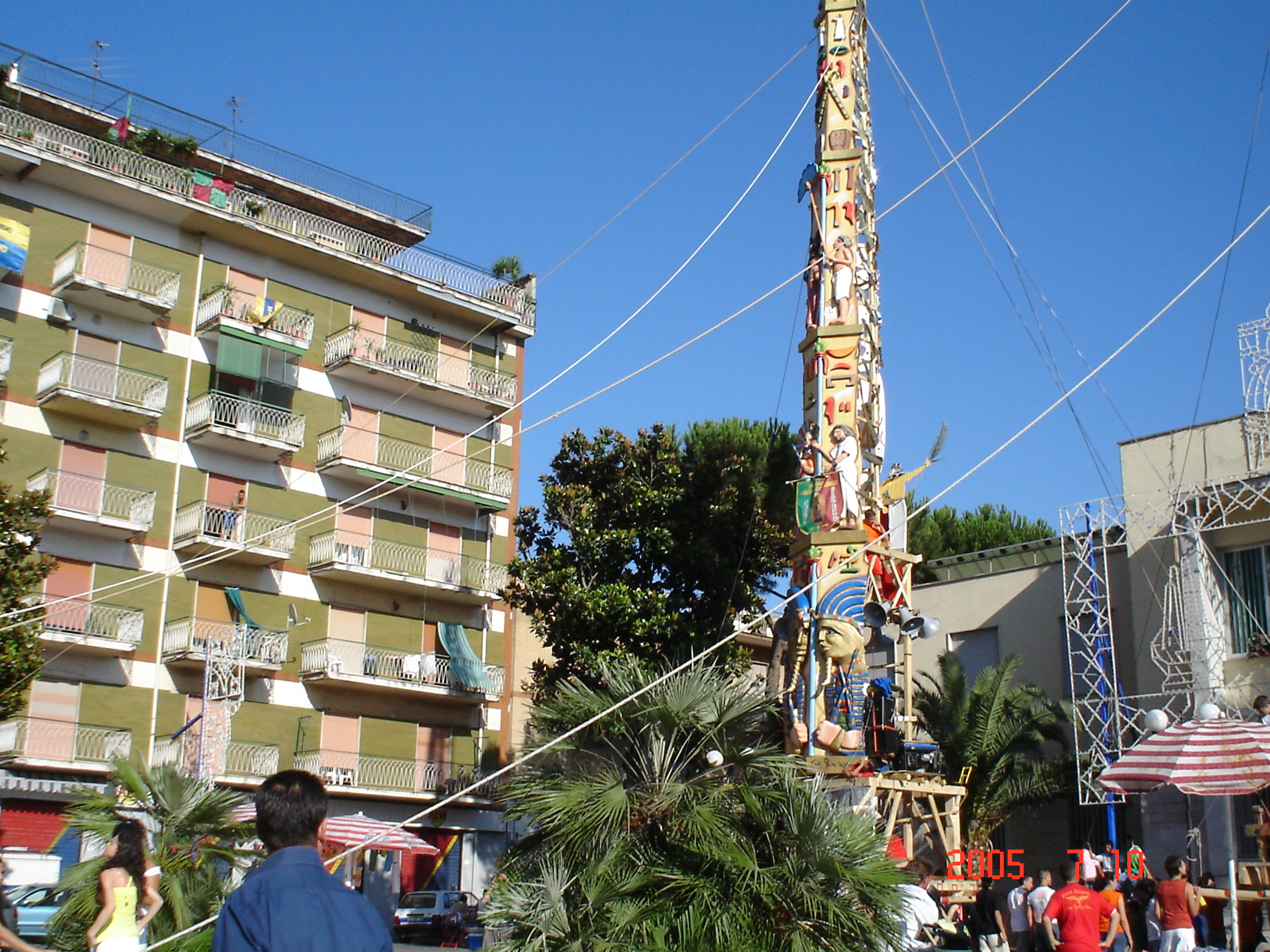 Gigli di Casavatore, giglio in piazza paranza casavatorese Nuova Gioventu'